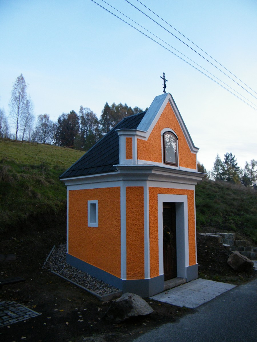 Kaple Korunování a Nanebevzetí Panny Marie v Kyjově